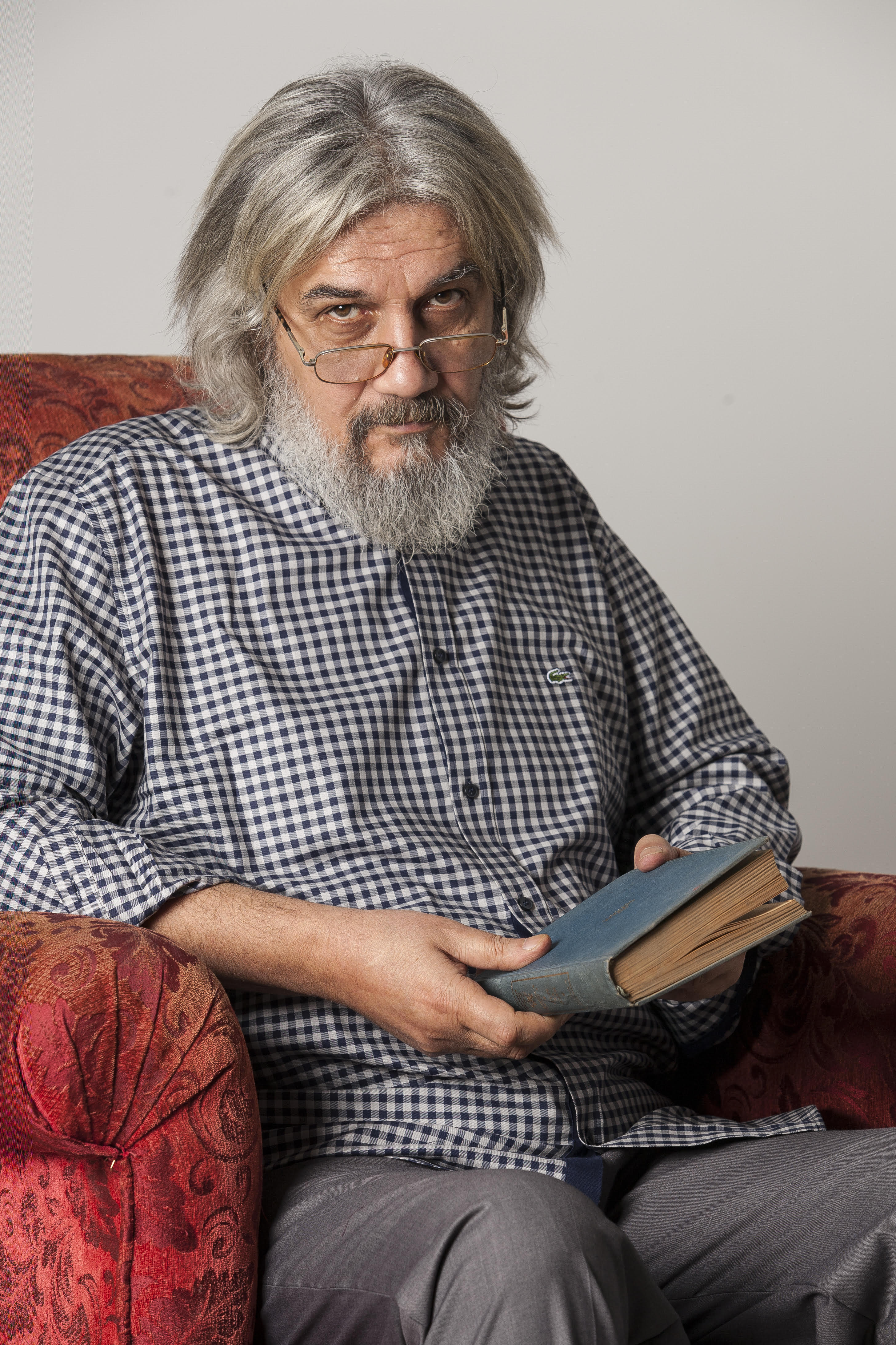 Adalet Mutlaka